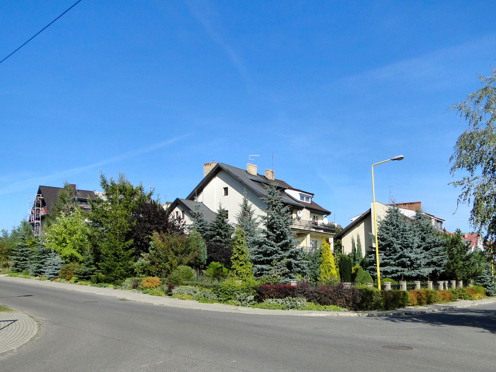 Współczesne budownictwo w Szczecinie Osowie